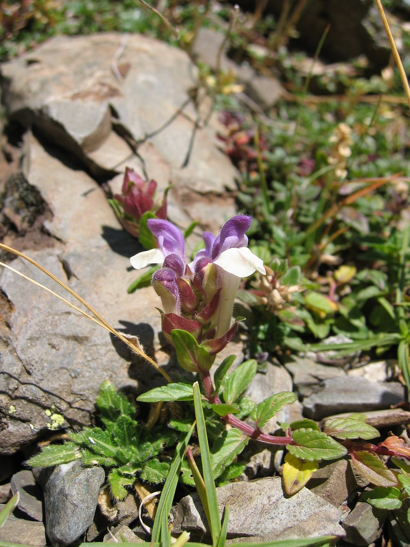 Scutellaria alpina Near Soques, Pyrenees, France